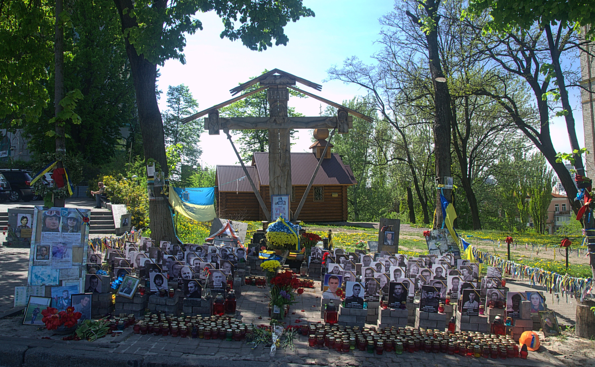 Меморіал Небесної сотні на вул Інститутській, травень, 2015 рік